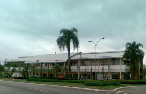 Alpha Mall Graciosa, localizado na entrada do bairro Alphaville Graciosa, em Pinhais, PR.